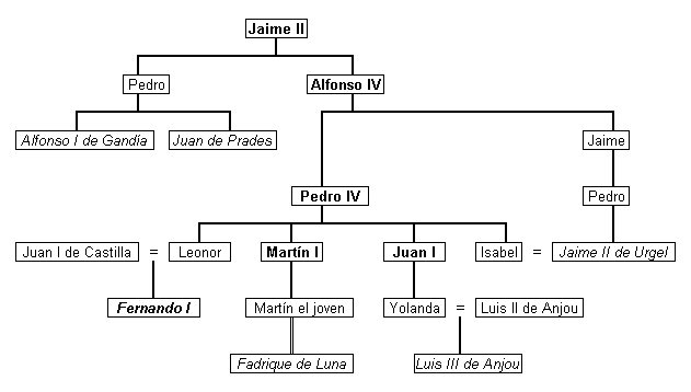 Árbol genealógico de los aspirantes a la corona de Aragón durante el compromiso de Caspe